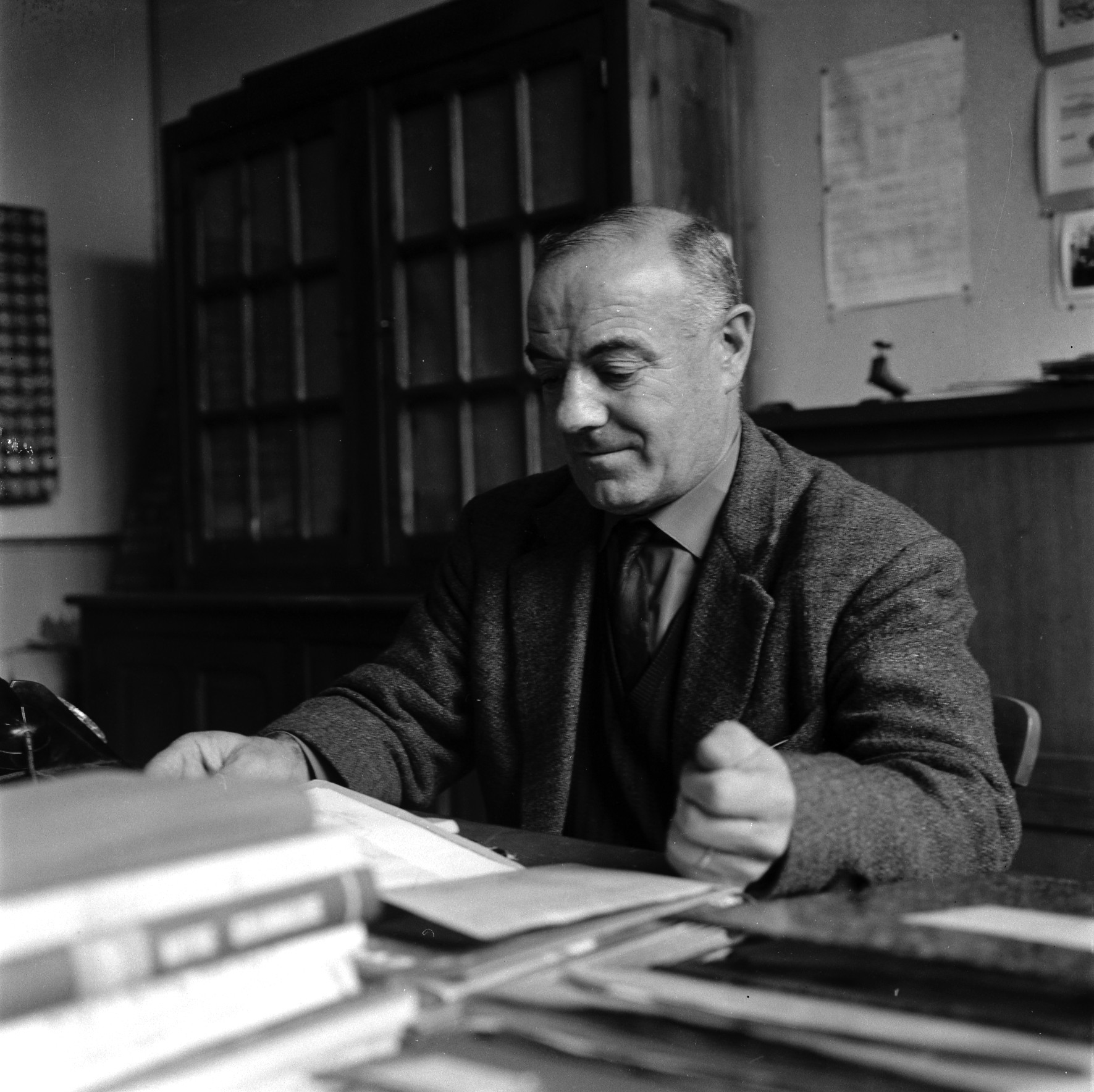 Pas de lieu. Le 26 Septembre 1962. Vue de Monsieur Balandrade assis derrière un bureau.